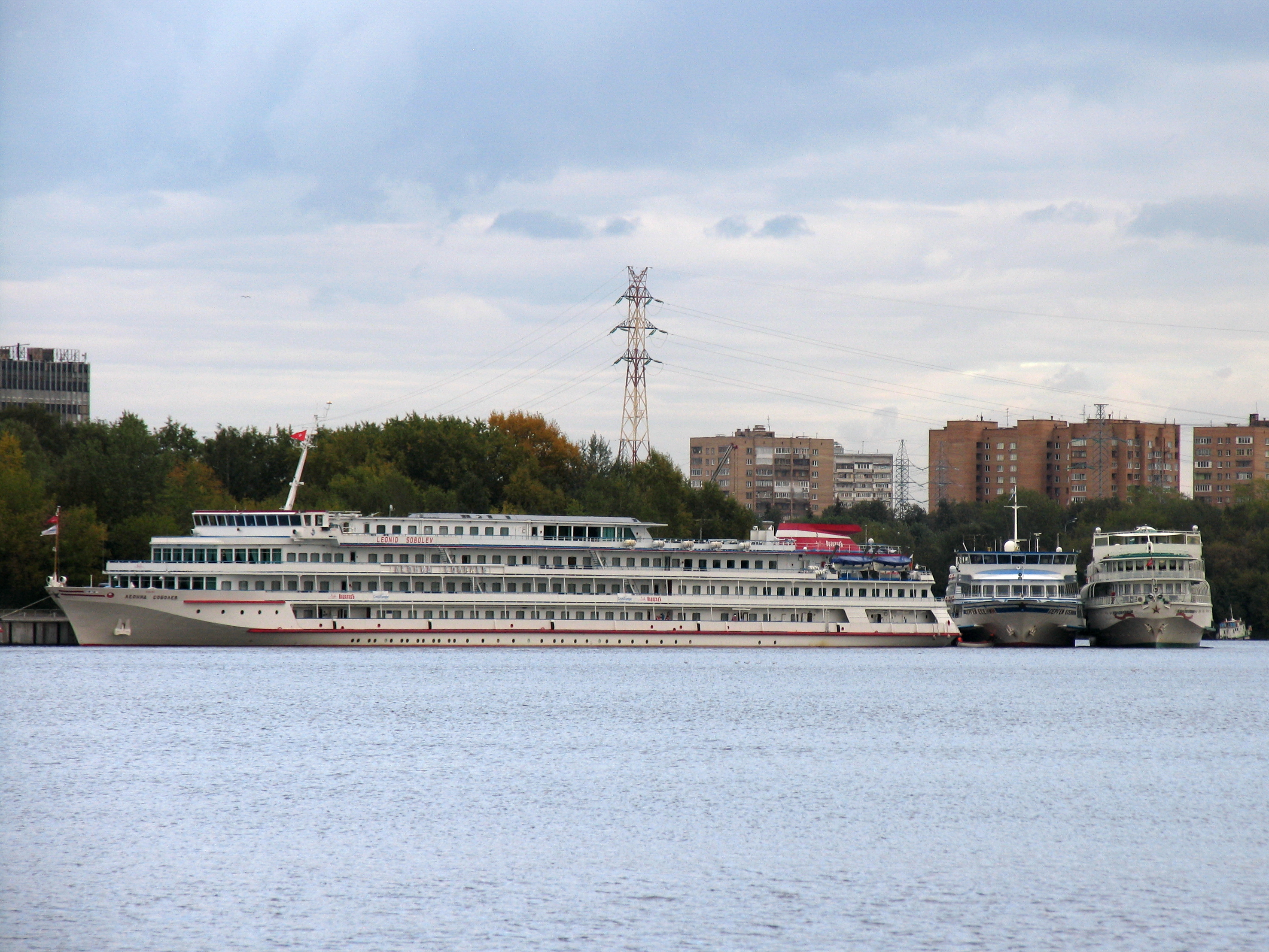 Речное круизное судно "Леонид Соболев" в Северном речном порту, Москва.